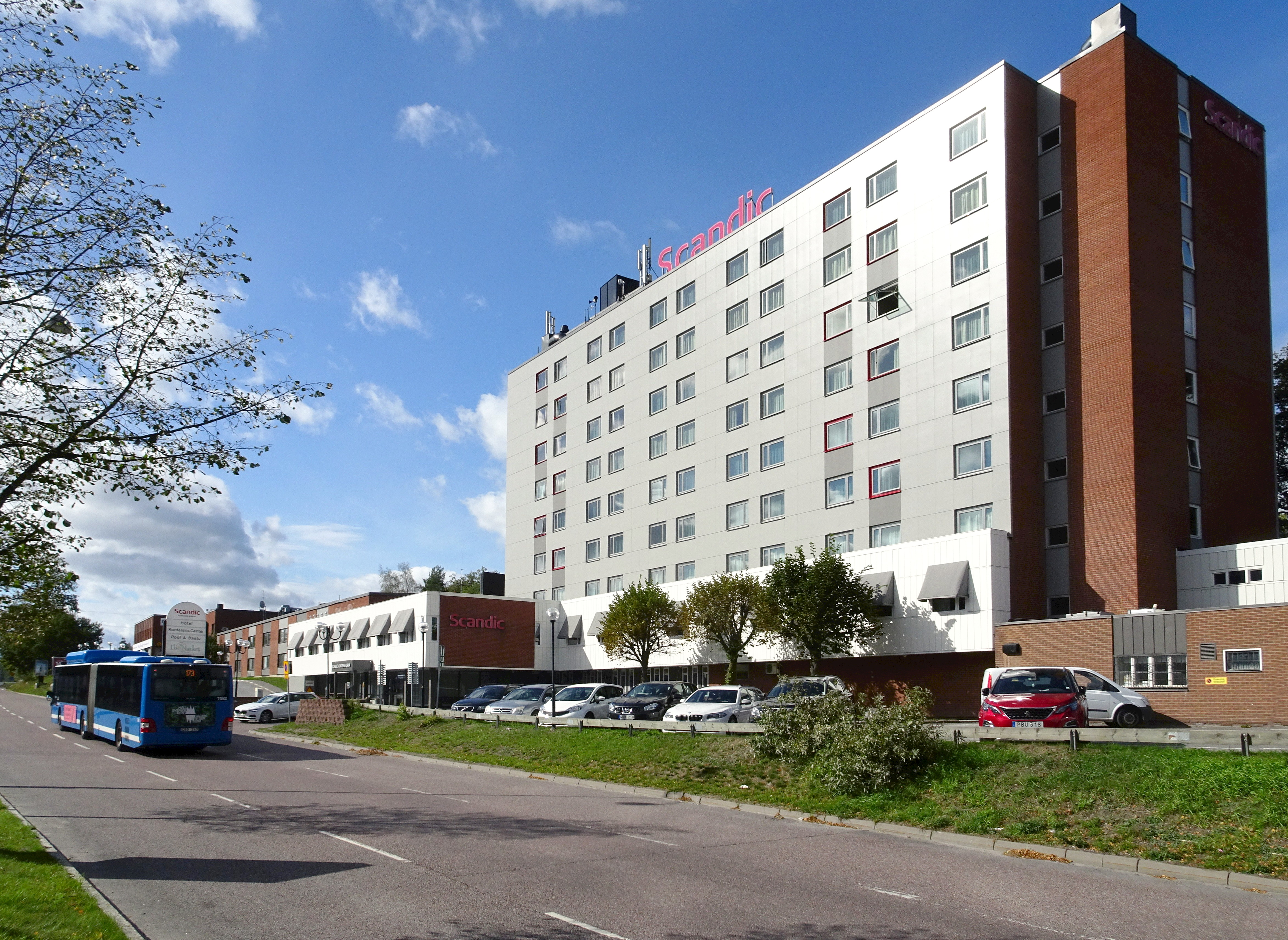 Scandic hotel Kungens kurva, f.d. Esso motorhotell, uppfört 1968 efter ritningar av Lennat Billgren